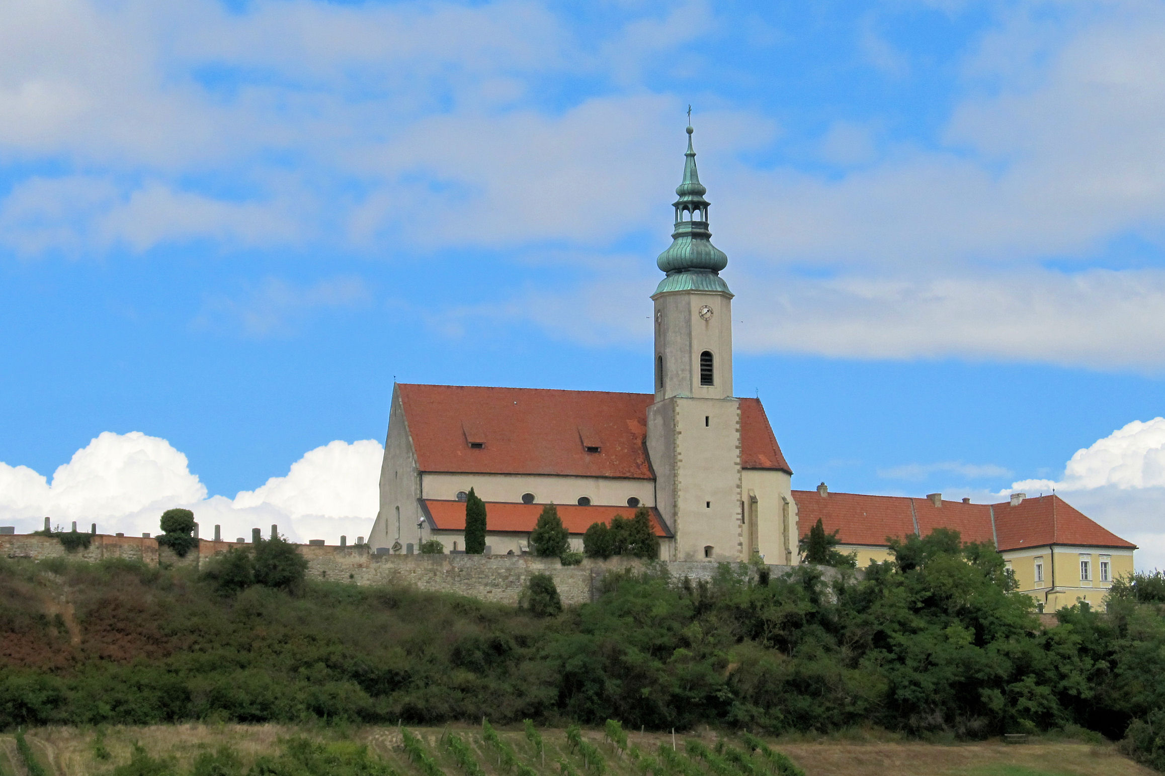 Hausleiten - Pfarrkirche an der Wagramkante (2012)